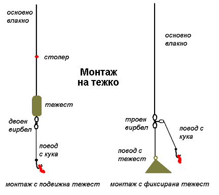 На тежко